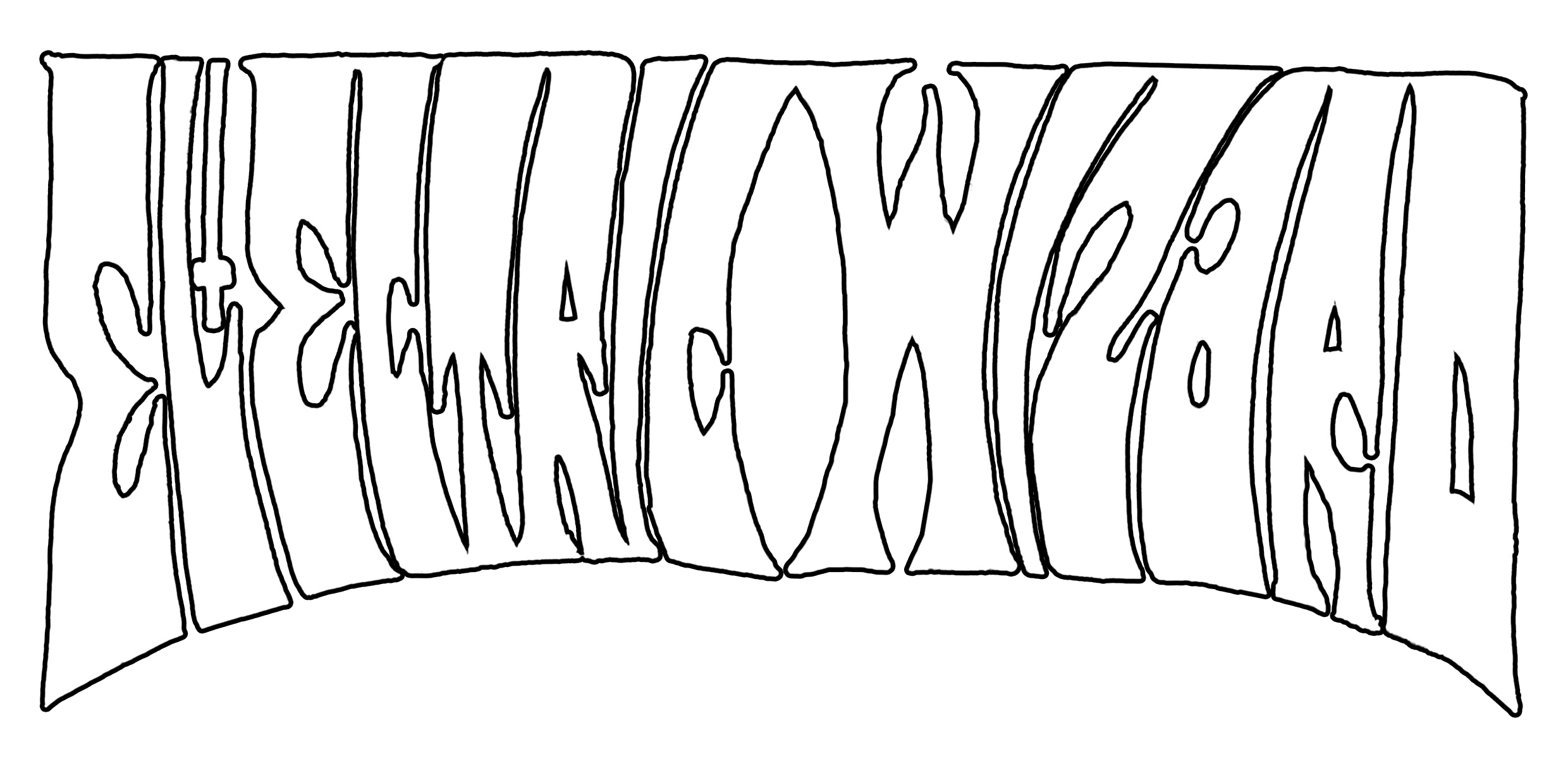 Logo d'Electric Wizard